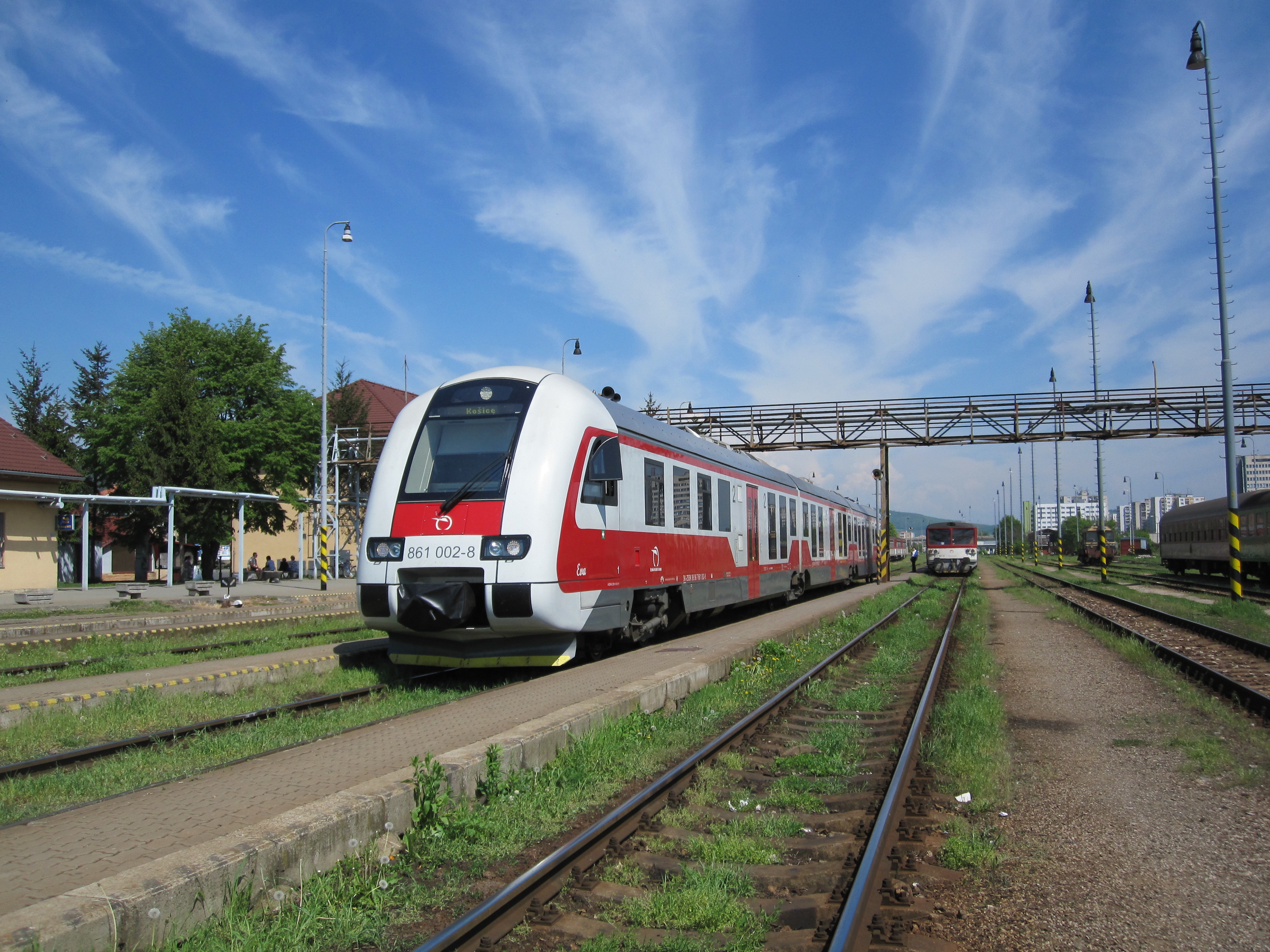 Motorová jednotka 861.002 Železniční společnosti Slovensko, Humenné